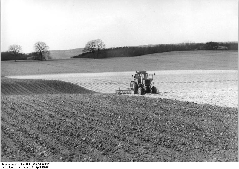 LPG Burg Stargard, Vorbereitung der Aussaat ADN-ZB Bartocha roe-9.4.90 Bez. Neubrandenburg: Frühjahrsbestellung. Nach dem milden Winter besteht in diesem Frühjahr ein etwa dreiwöchiger Vegetationsvorsprung. In der LPG Burg Stargard wird hier bei Groß Nemerow der Acker für das Pflanzen von Kartoffeln vorbereitet.